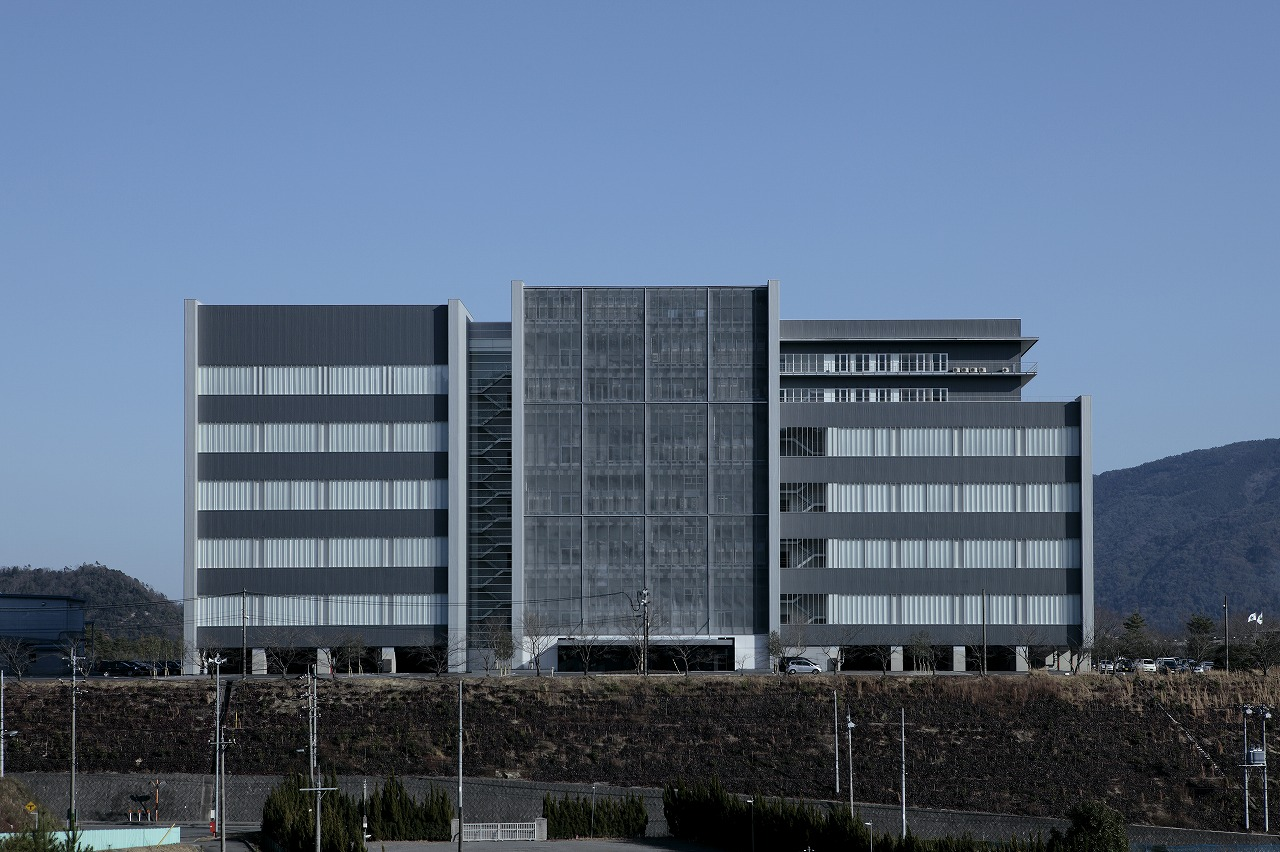 ディスコ広島事業所 桑畑工場